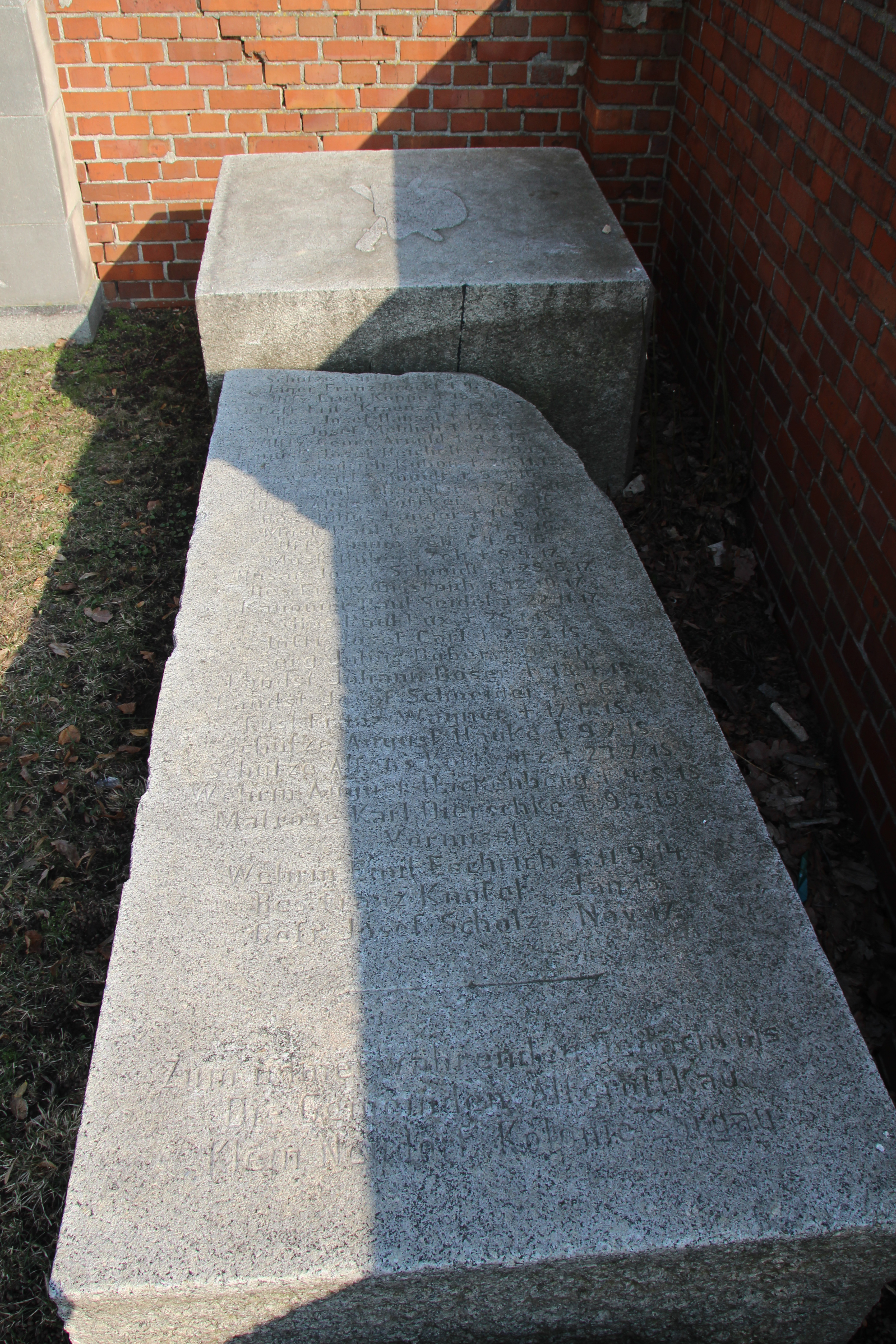 Stary Grodków – wieś w Polsce, w województwie opolskim, w powiecie nyskim, w gminie Skoroszyce.